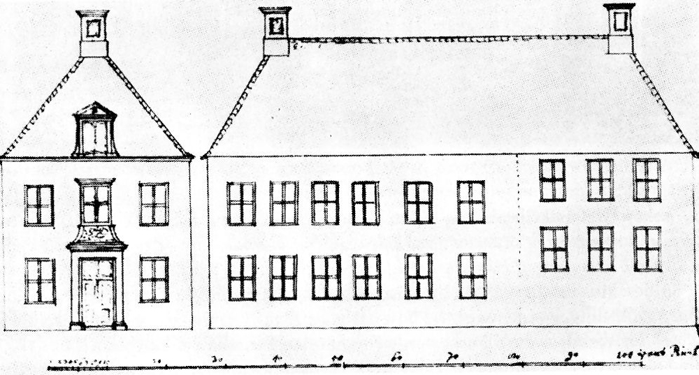 Nordhorn